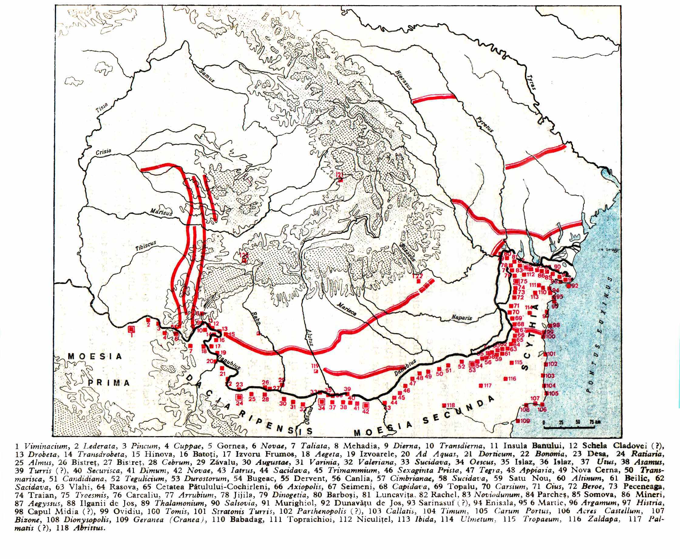 Carte des castrae et des levées de terre de Dacie et Mésie, redessinée d'après Alexandre Xenopol : " énigme historique: les Roumains au Moyen Âge", E. Leroux, Paris, 1883 et "Histoire des Roumains de la Dacie Trajane", E. Leroux, Paris, 1896, cités dans Ferdinand Lot : "La Fin du monde antique et le début du Moyen Âge", La Renaissance du Livre, Paris, 1927.